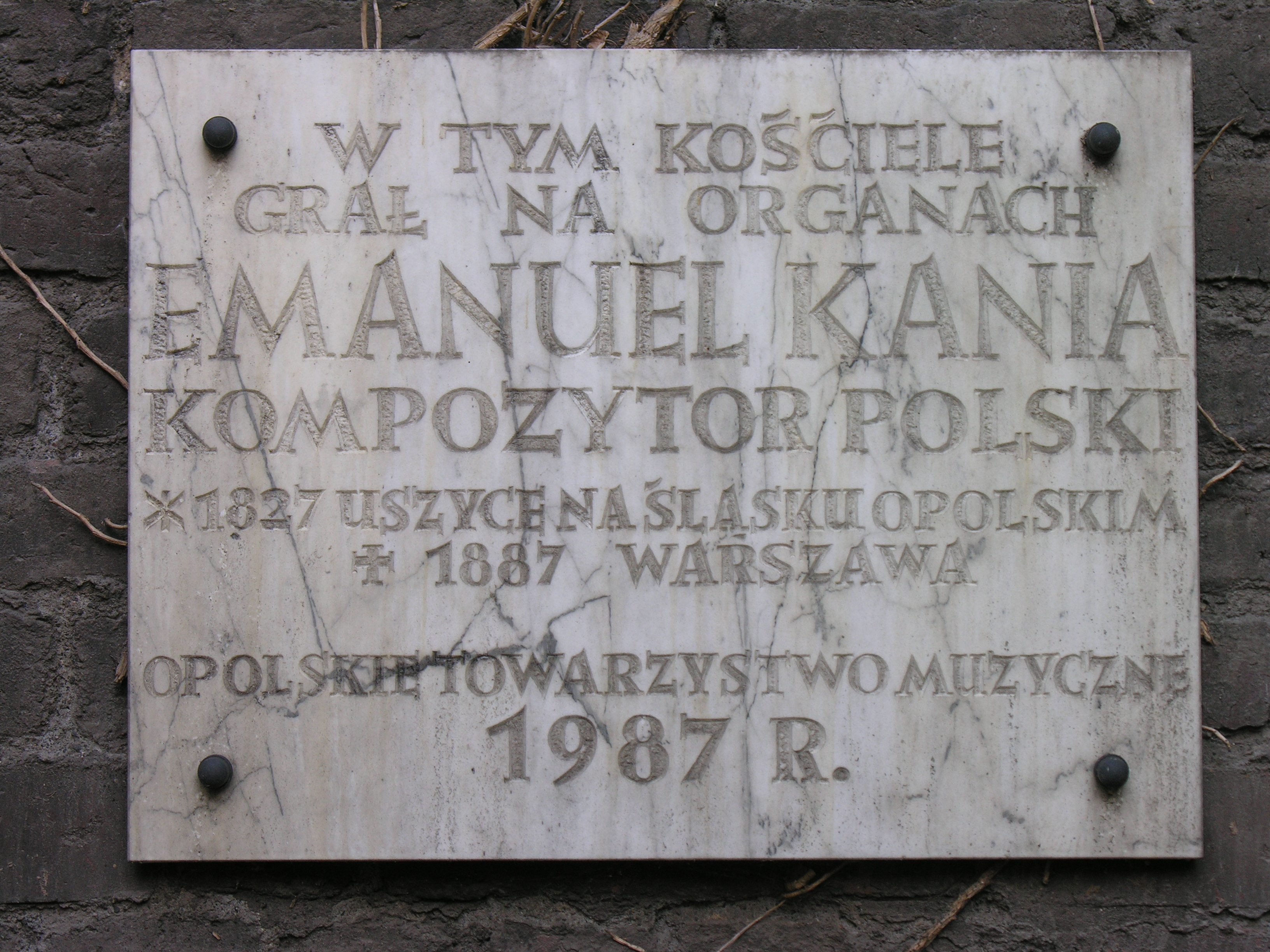 Tablica ku Czci Emanuela Kani na kościele św. Macieja we Wrocławiu